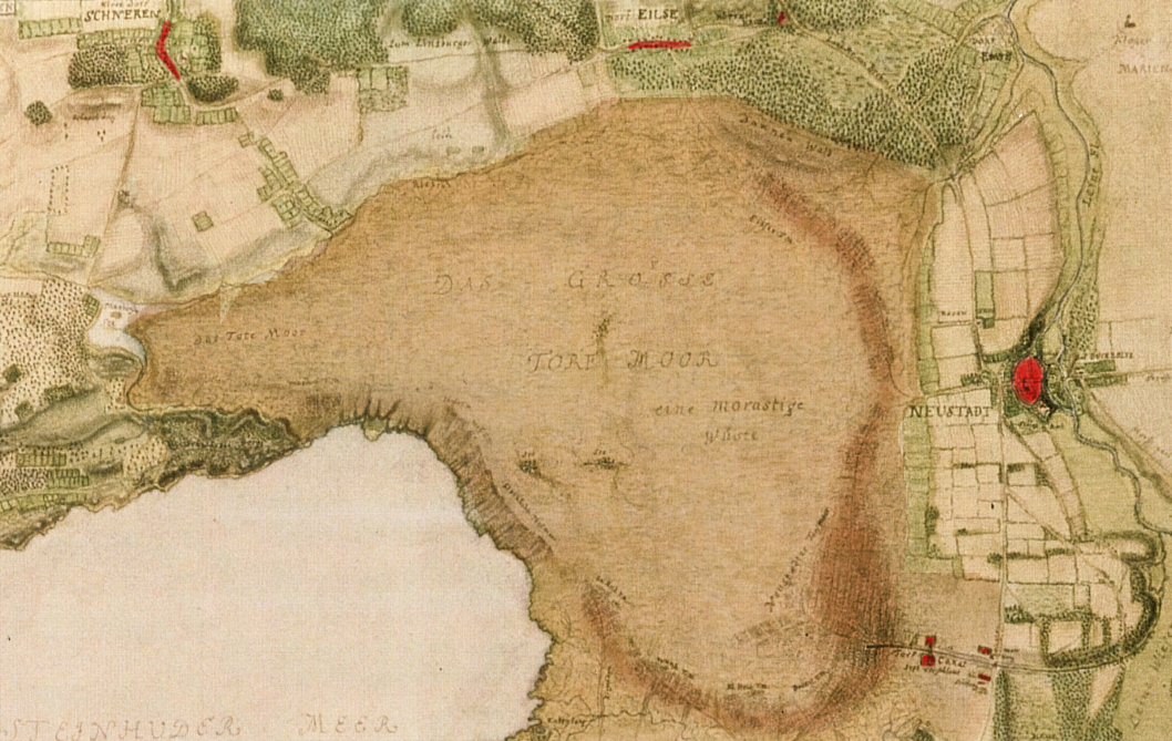 Totes Moor 1770, bezeichnet als Großes Torfmoor, eine morastige Wüste, dunkelbrauner Randstreifen als bäuerlicher Torfstich, rechts Neustadt.